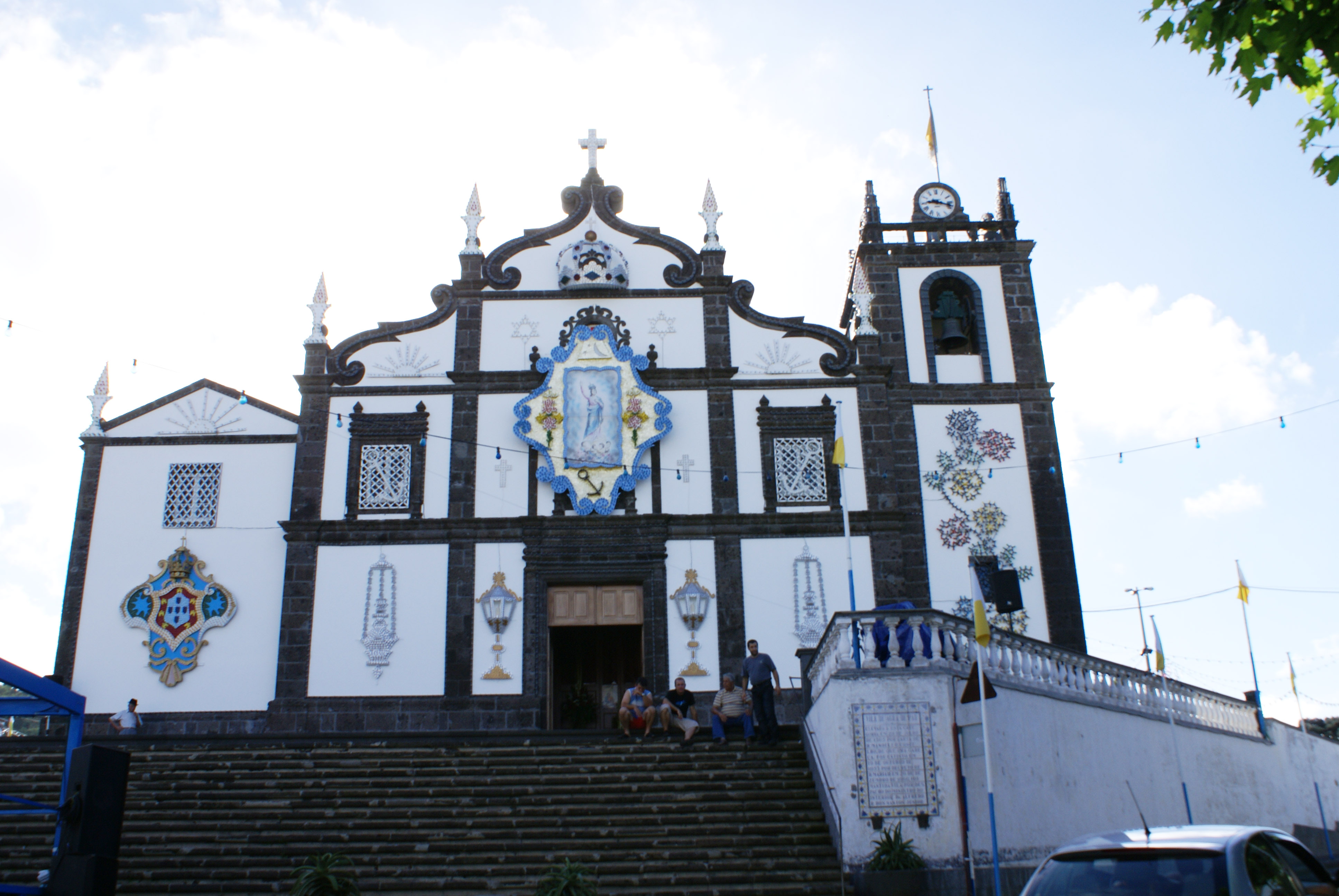 Fachadae - Igreja Paroquial de Água de Pau / Igreja de Nossa Senhora dos Anjos. Portugal, Açores, Ilha de São Miguel, (Ponta Delgada), Lagoa, Água de Pau.